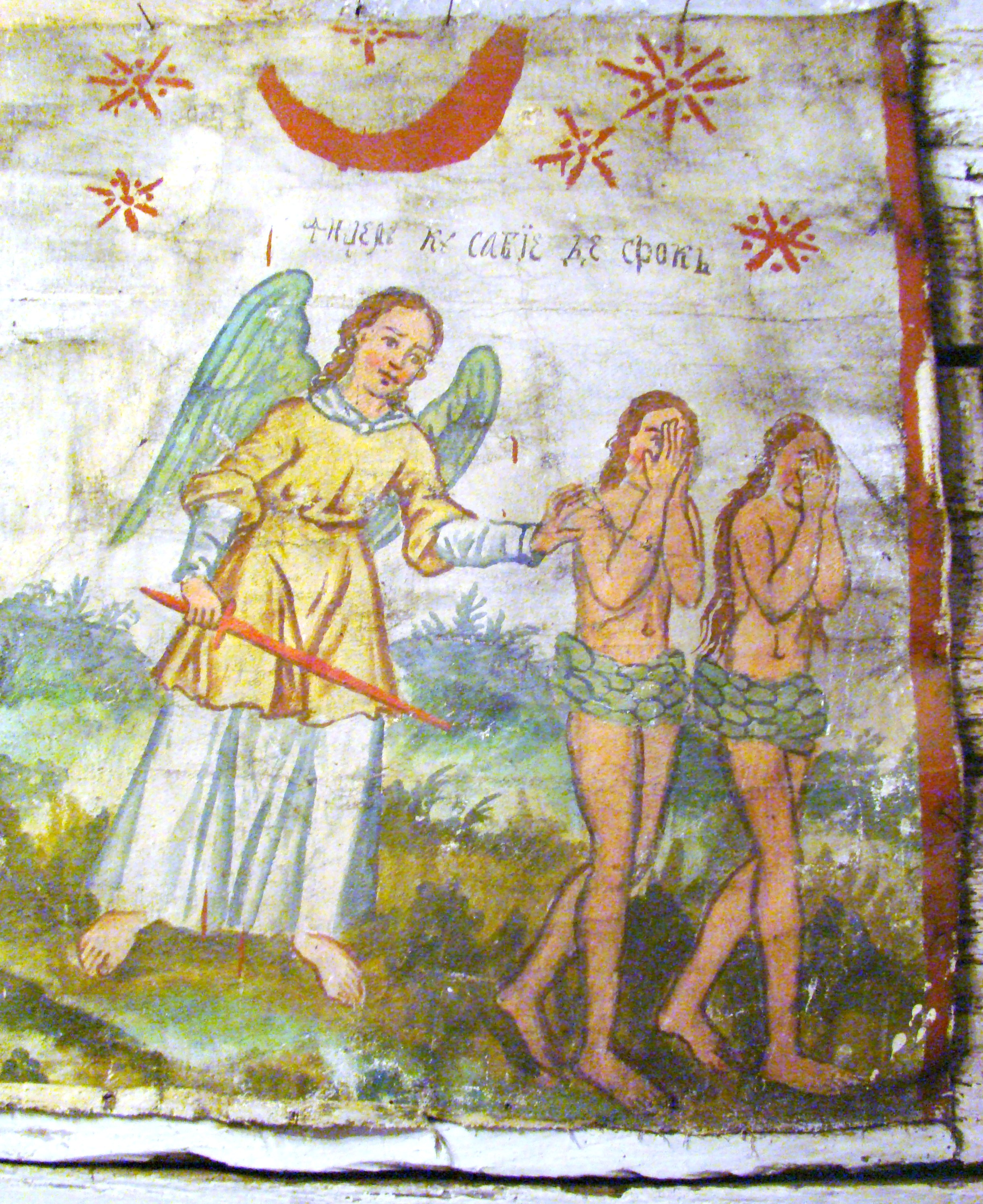 Biserica de lemn "Sfinții Arhangheli Mihail şi Gavril", sat PLOPIŞ; comuna ŞIŞEŞTI